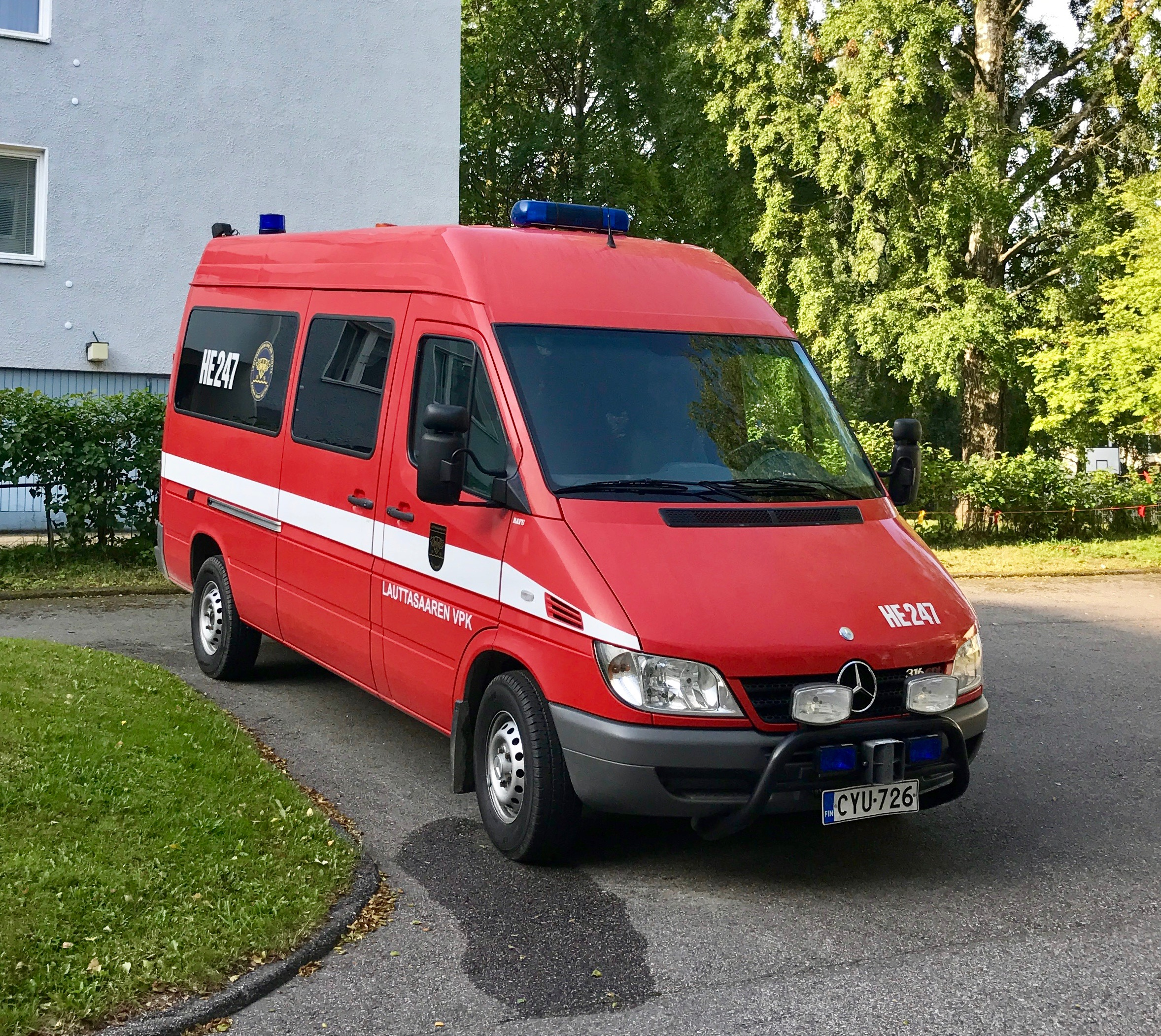 Lauttasaaren VPK:n miehistönkuljetusauto HE247.